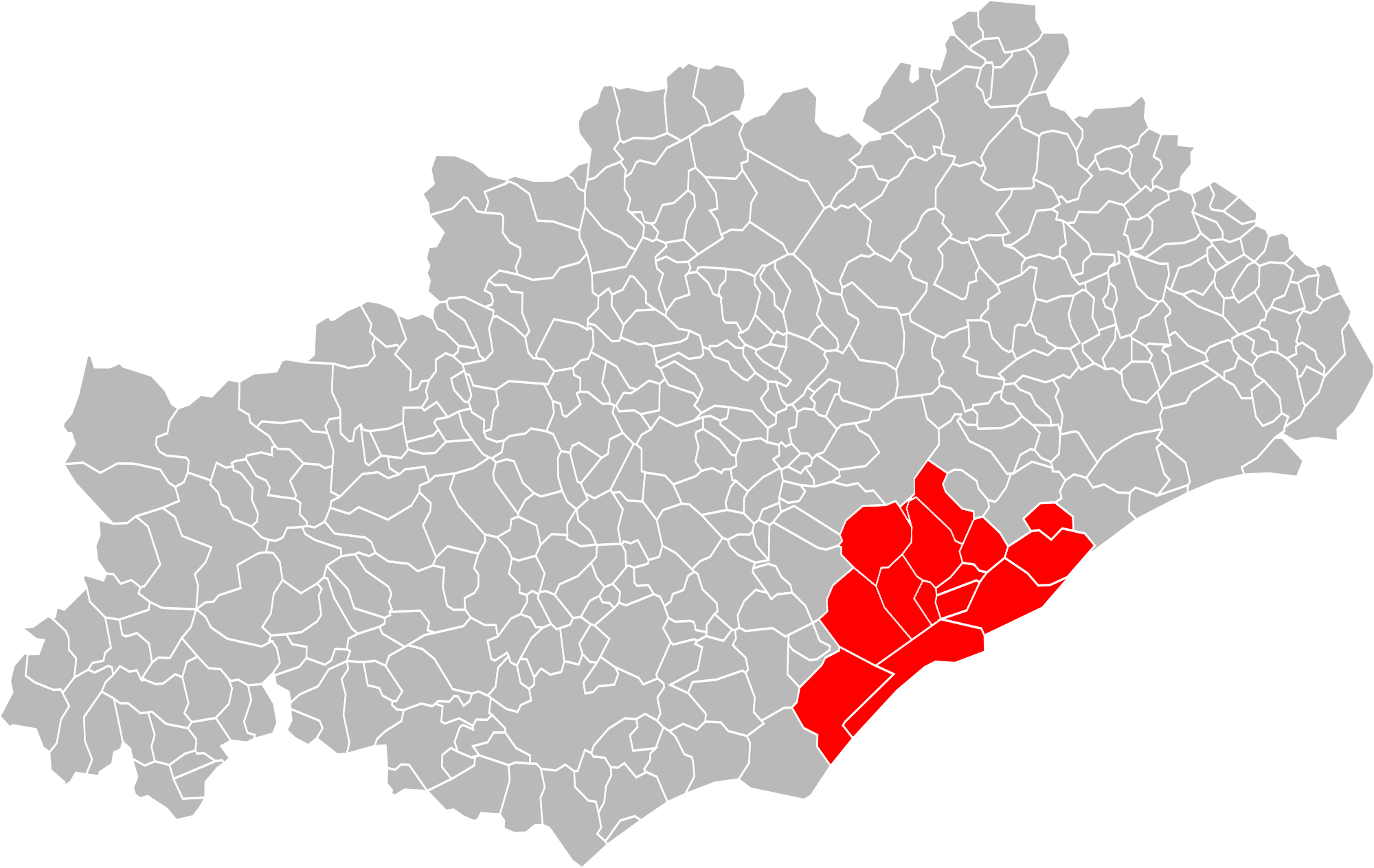 Localisation EPCI du bassin de Thau dans l'Hérault, France 2017